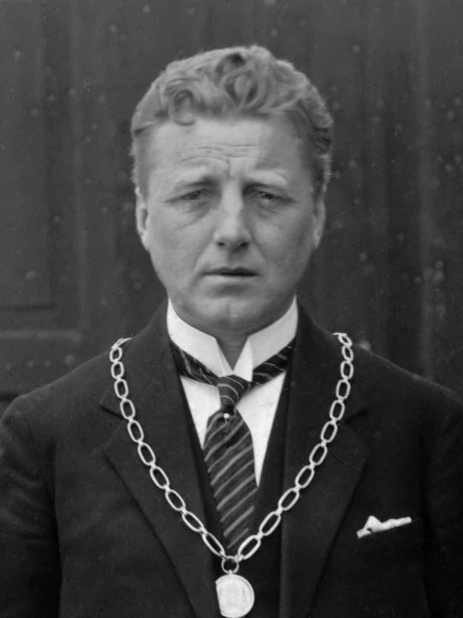 Jac. Bleeker, burgemeester van Utingeradeel 1929